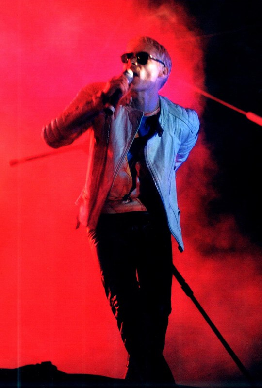 Andrew Eldritch at 2000 M'era Luna (Hildesheim - Germany)